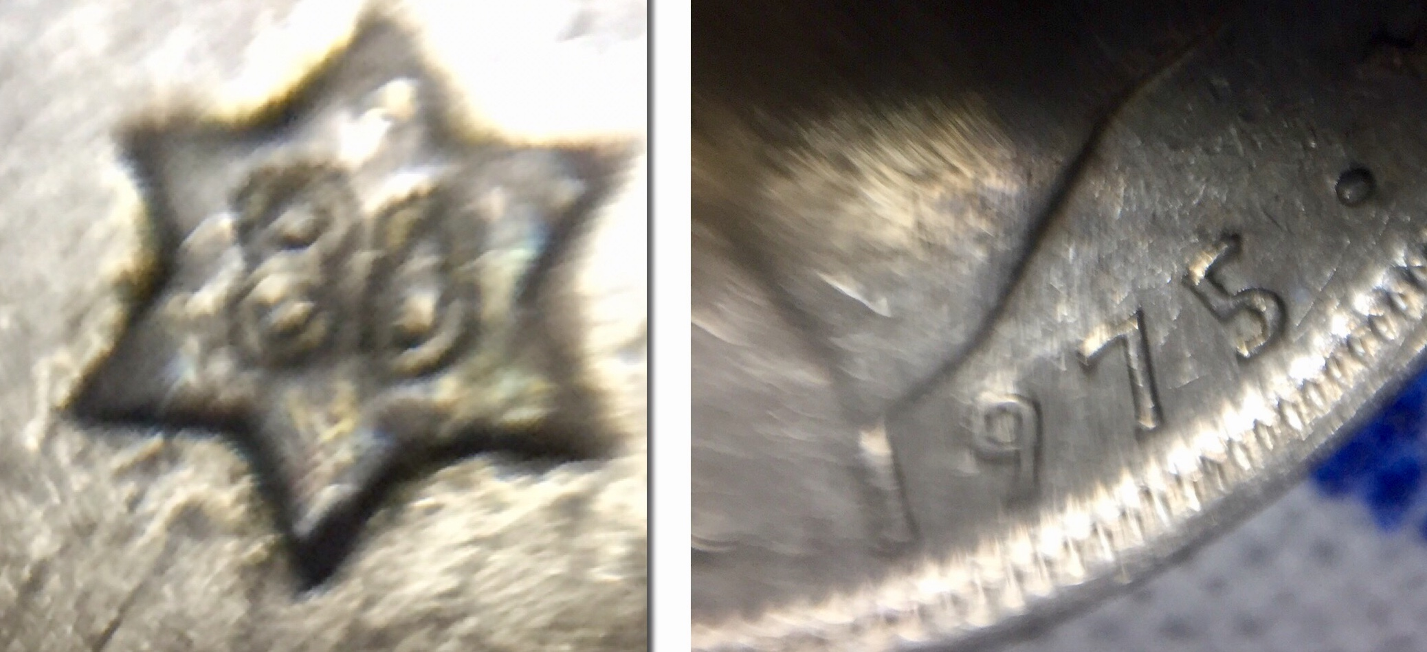 Data de cuñaxe (1980) na estrela e data de aprobación da emisión (1975) baixo o busto, nunha moeda española.